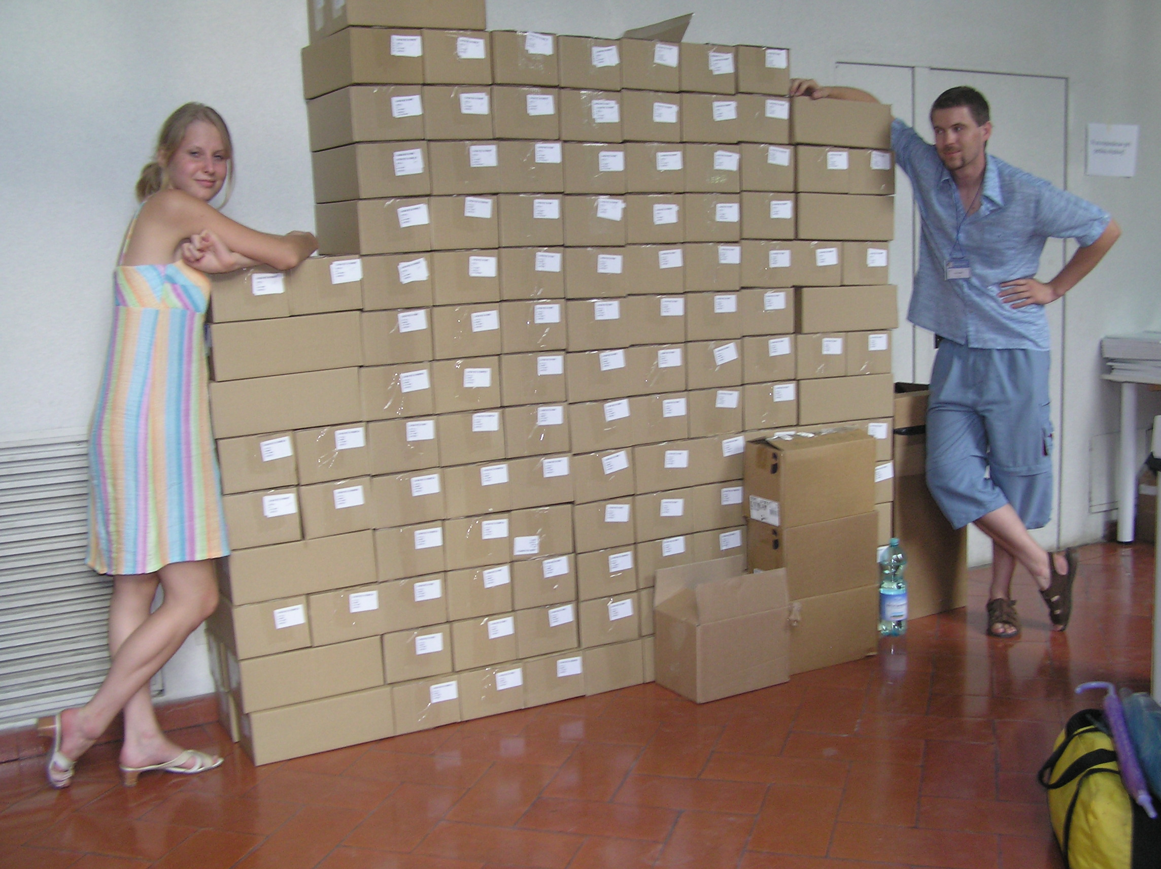 Skatoloj enhavantaj parton de la tuta stoko (9000 ekzempleroj) de la DVD Esperanto Elektronike liveritaj per speciala kamiono el la diskopresejo en Ĉeĥio al la libroserva ĉambro de la kongresejo de la 91-a Universala Kongreso de Esperanto en Florenco (2006).